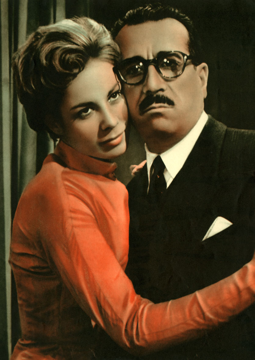 screen from film Non è vero ma ci credo (1956)